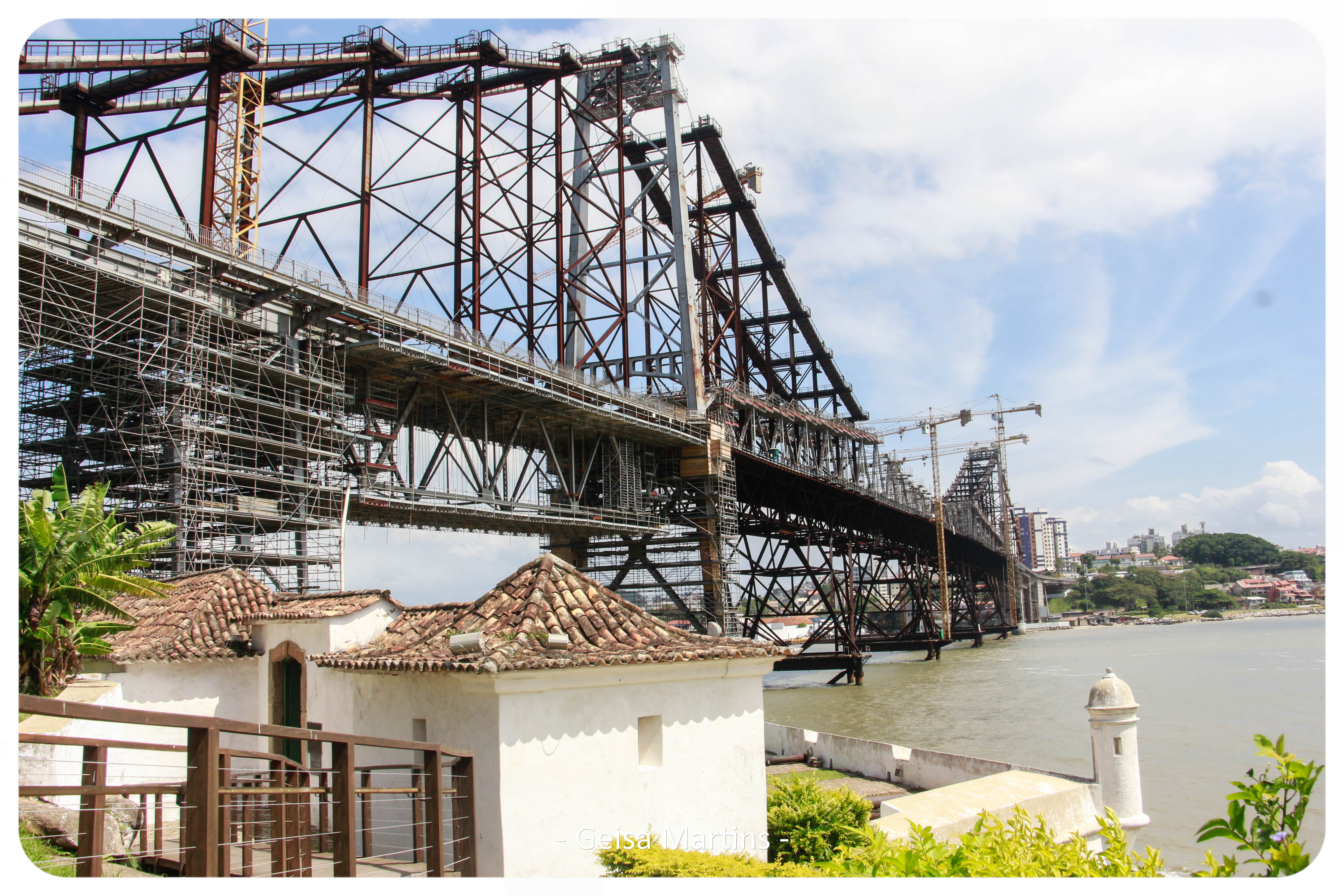 Cartão postal de Florianópolis